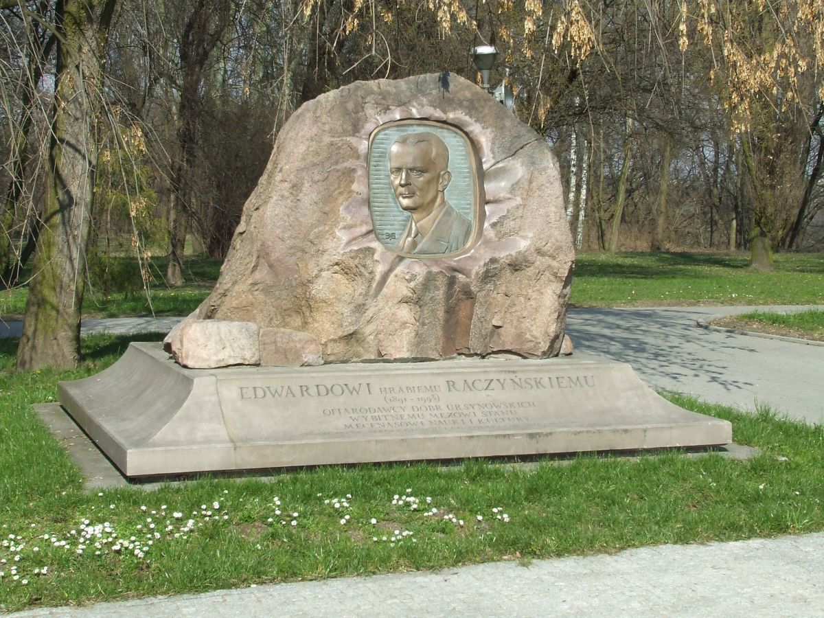 Pałac Juliana Ursyna Niemcewicza, obecnie rektorat SGGW, pomnik Edwarda Raczyńskiego